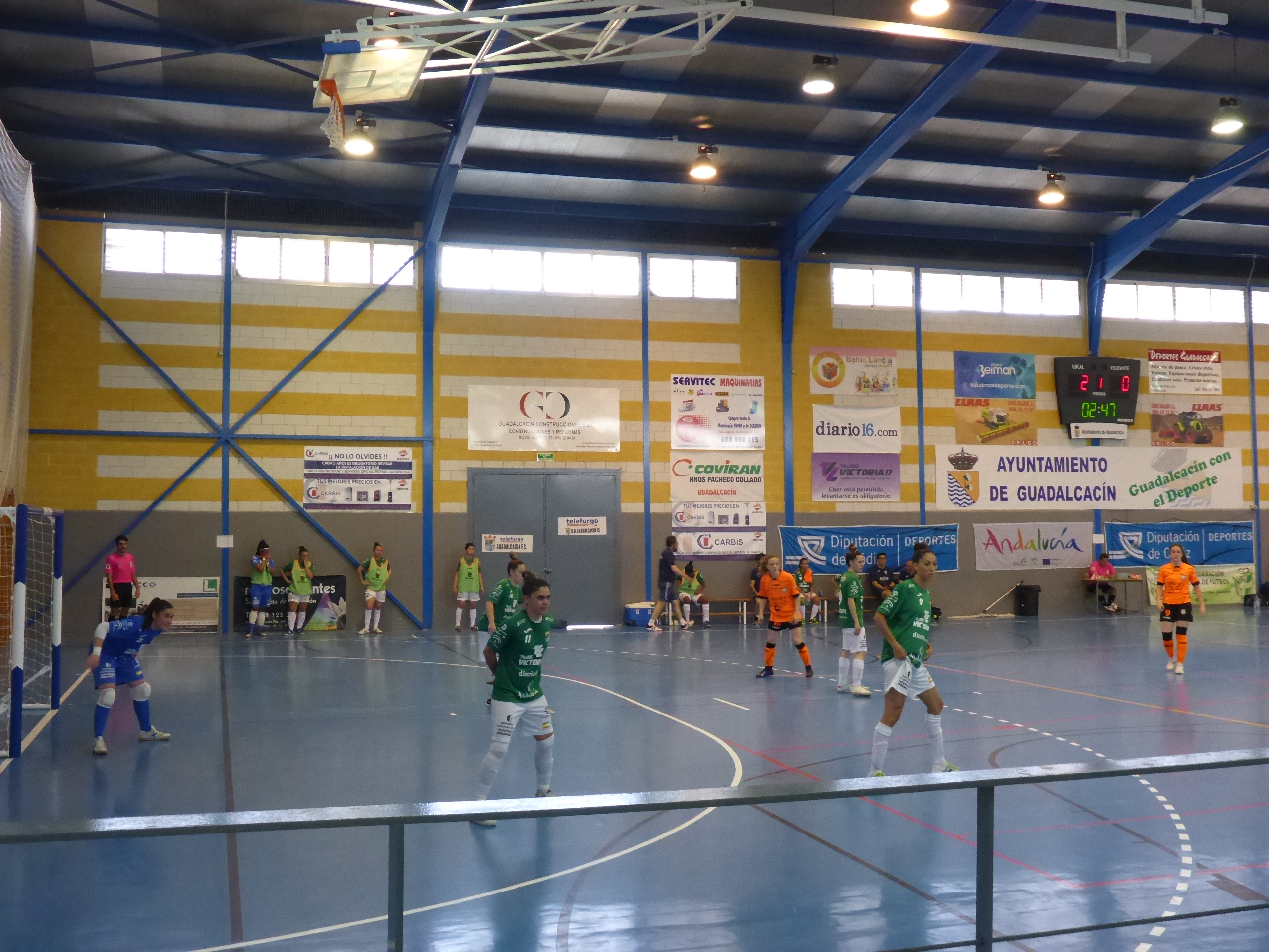 Partido Guadalcacín FS CD - Viaxes Amarelle FS, 25 Mayo 2019 Primera División de fútbol sala femenino en el Polideportivo Municipal de Guadalcacín